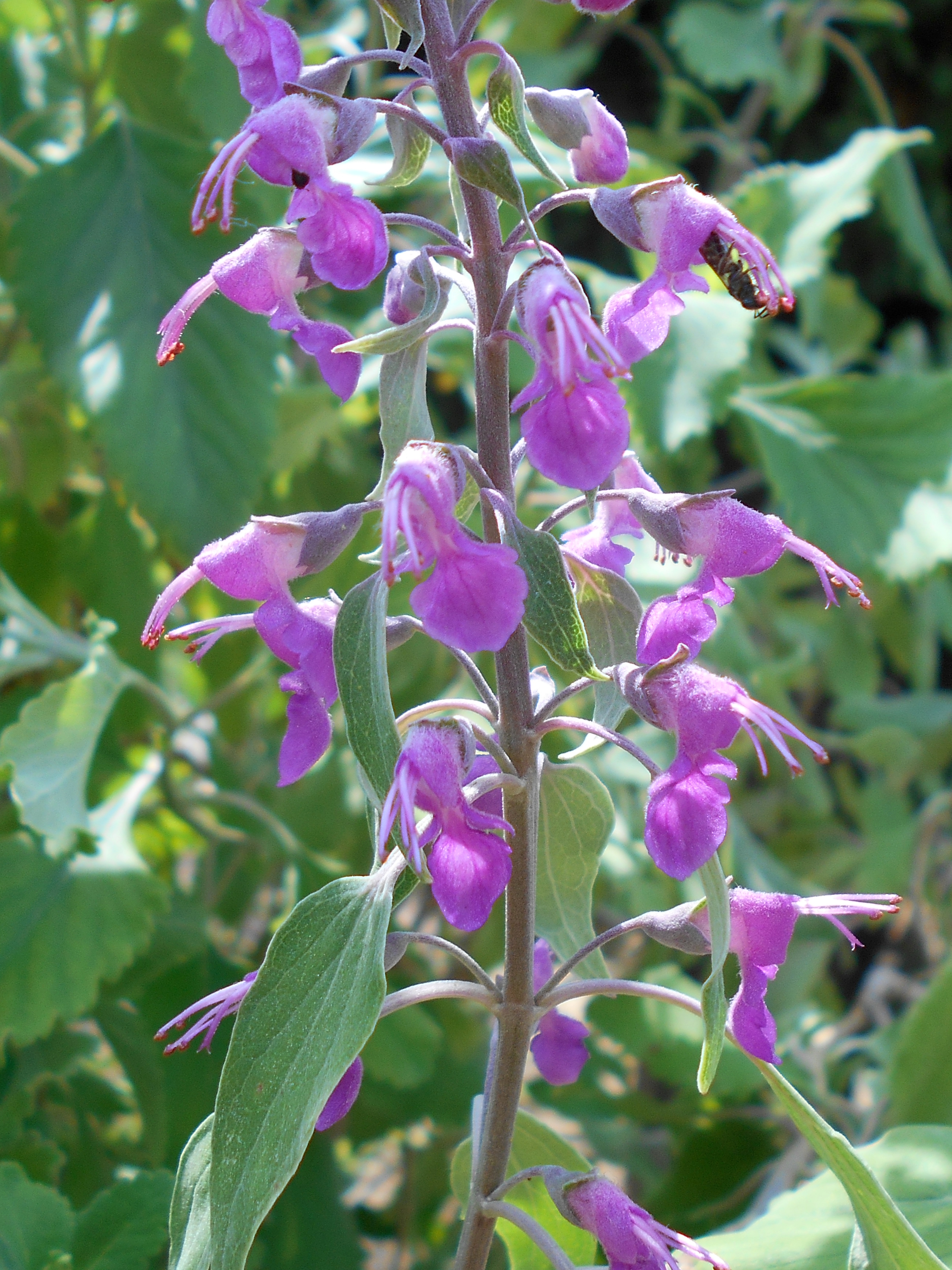 Teucrium betonicum, Botanischer Garten Berlin.